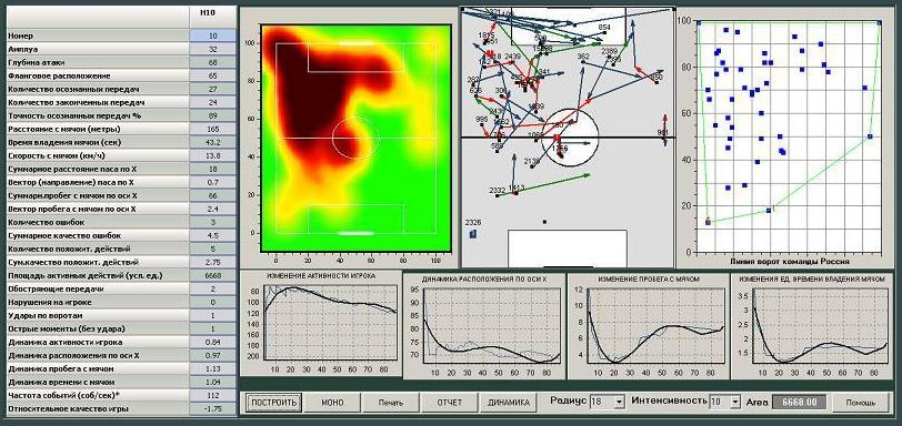 Пример профессиональной футбольной статистики игрока